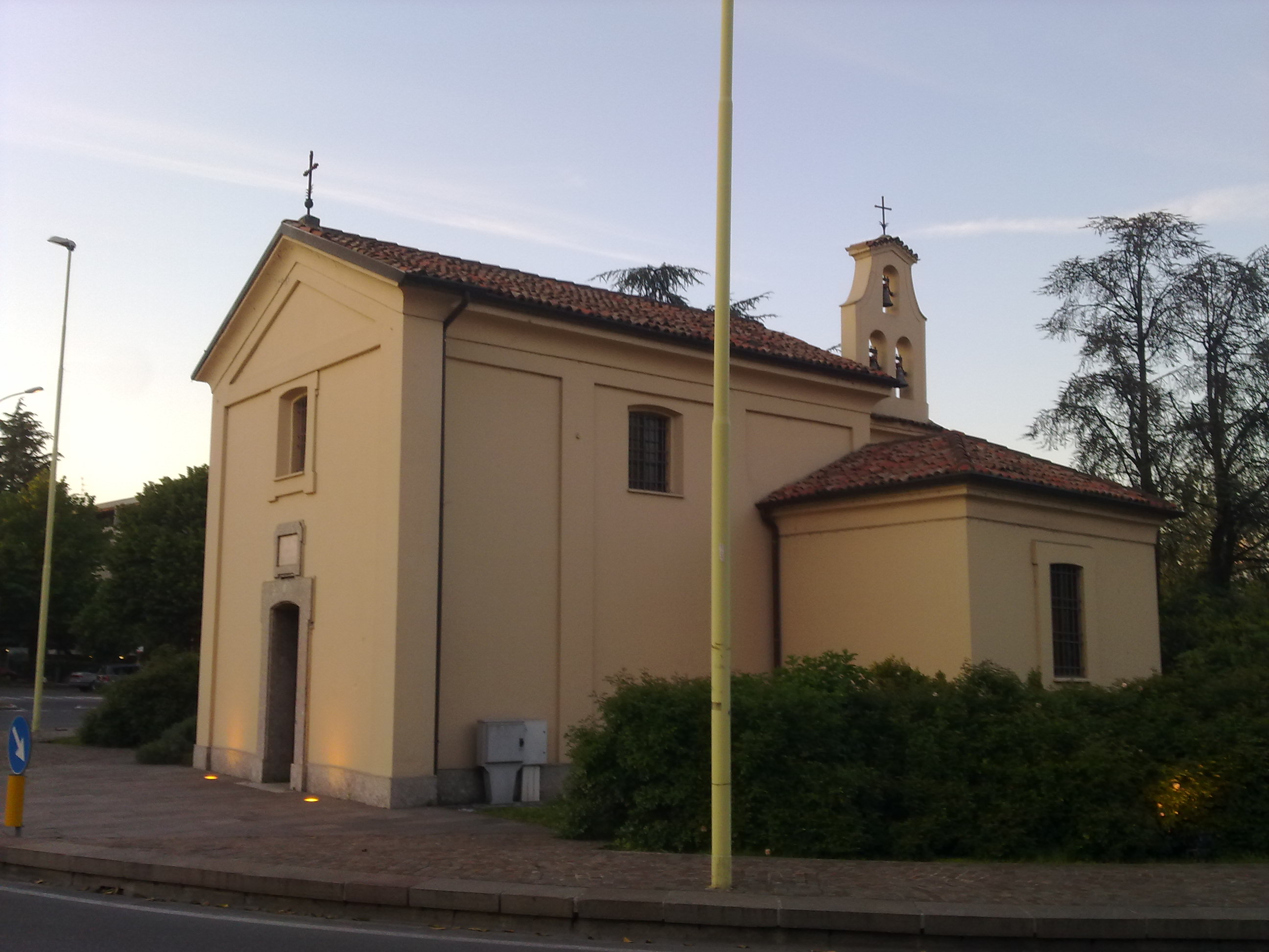 Chiesetta di San Biagio - Buccinasco - Vista da dietro e campanile